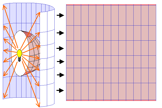 Het principe van een (cilindrische) kaartprojectie.